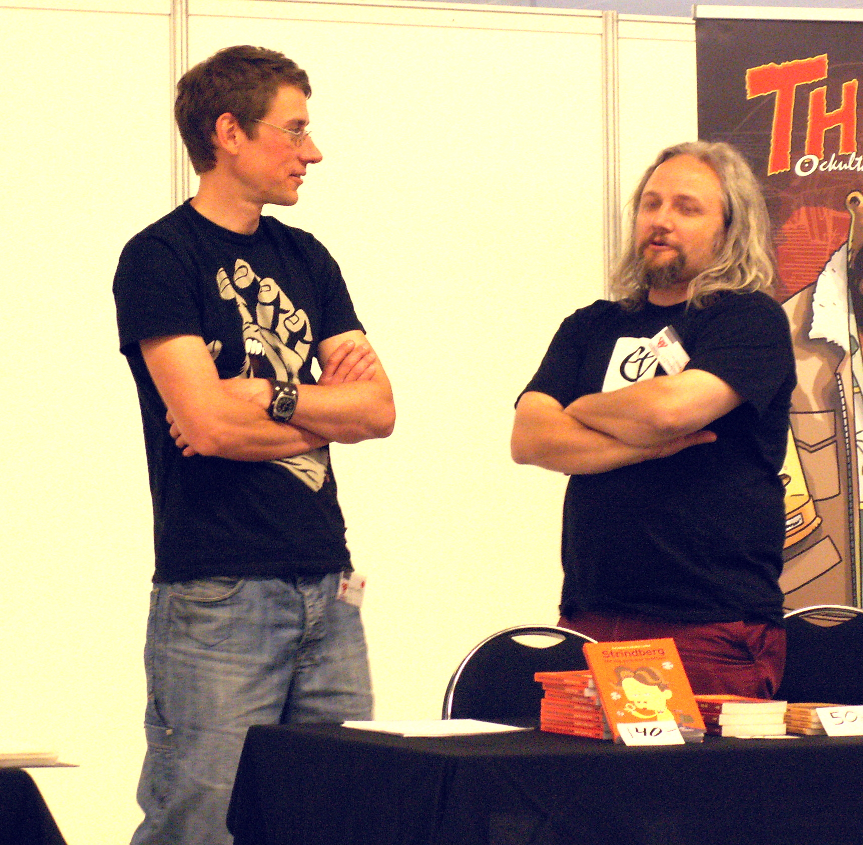 Henrik Lange och Mikael Tegebjer, på mässan Carlstad Comic Con 27 maj 2012.